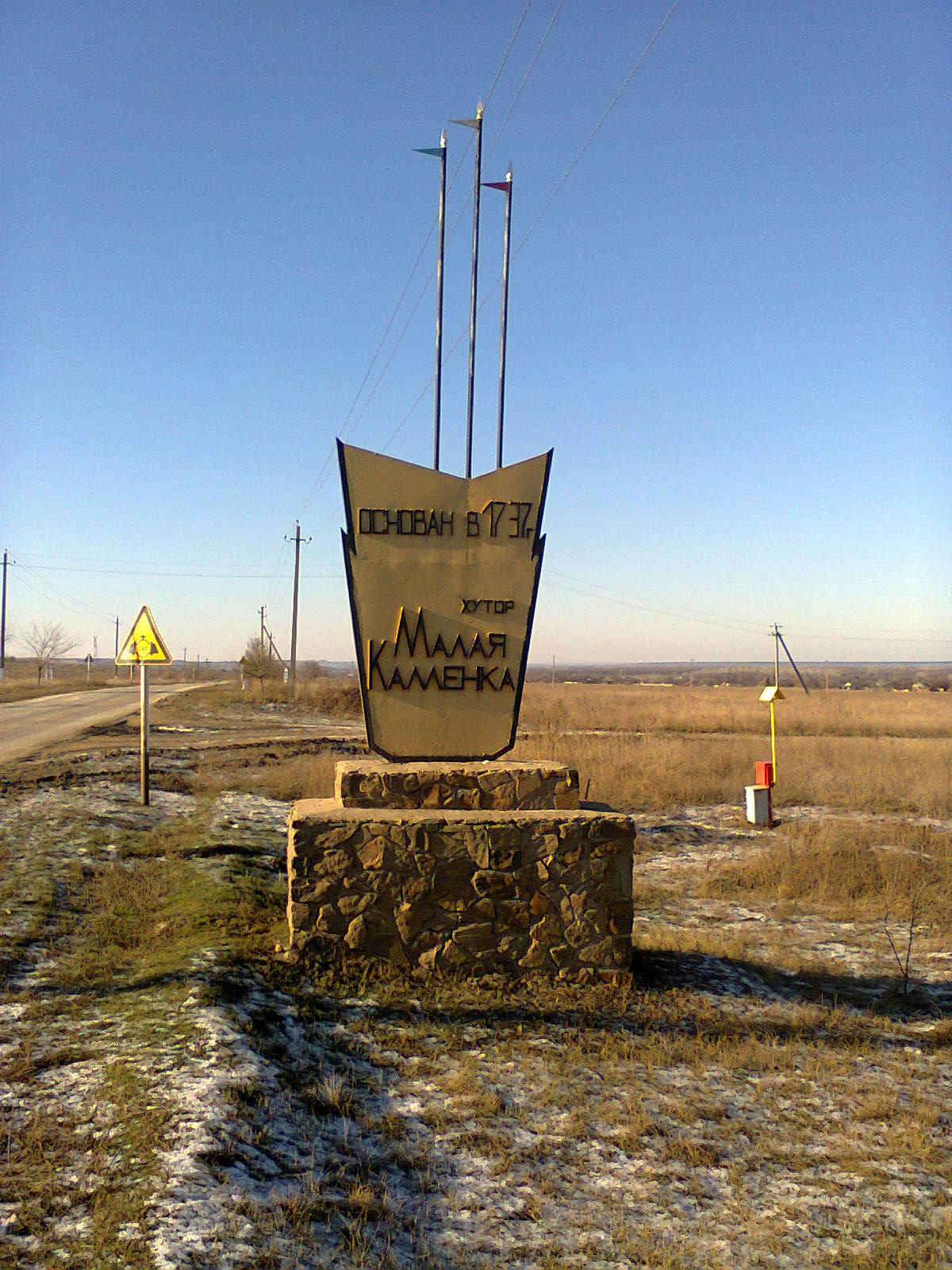 Стела на въезде в малую Каменку, Ростовская область.